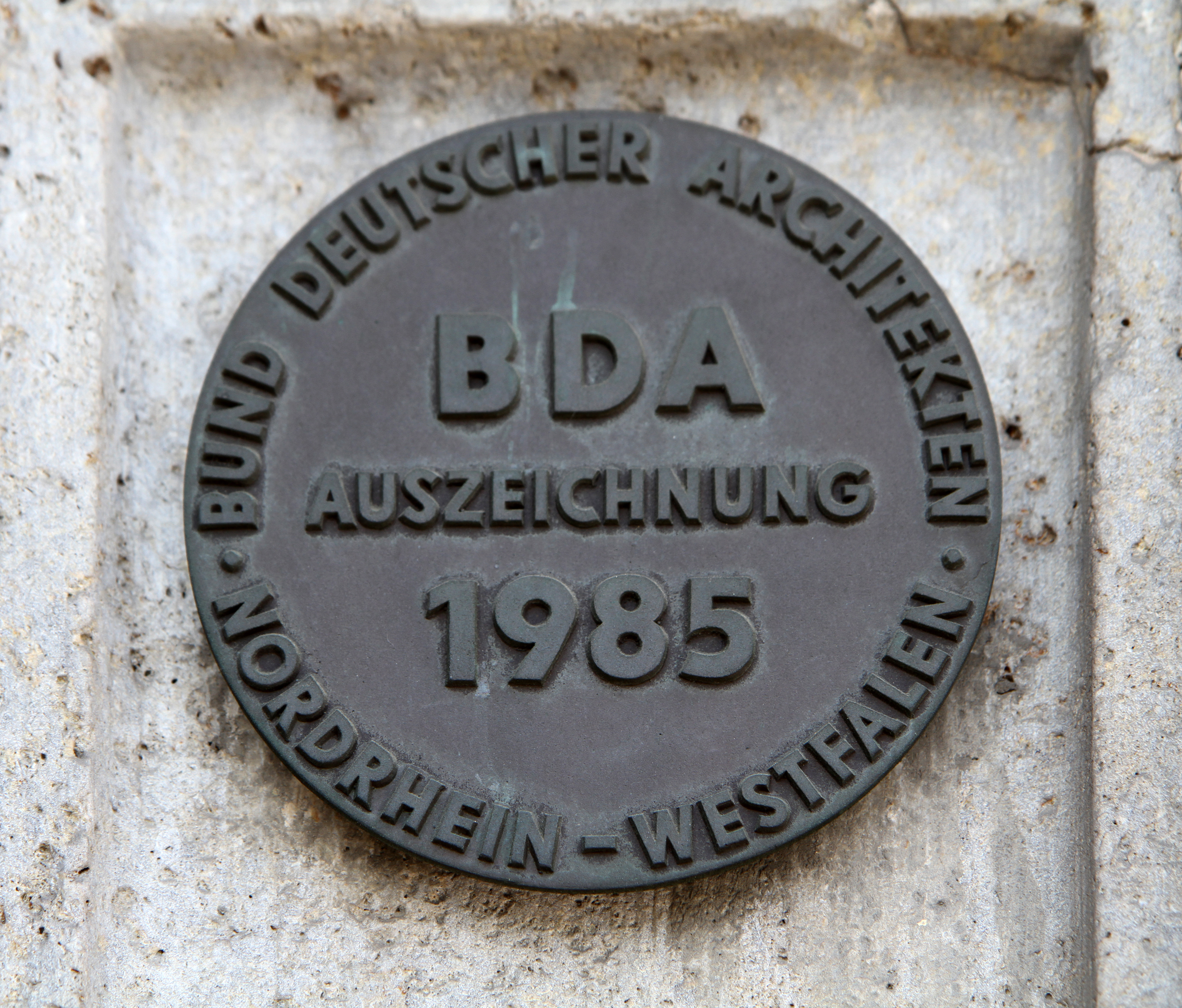 Denkmalgeschütztes ehemaliges Verwaltungsgebäude der Rheinbraun AG in Köln, Konrad-Adenauer-Ufer 55